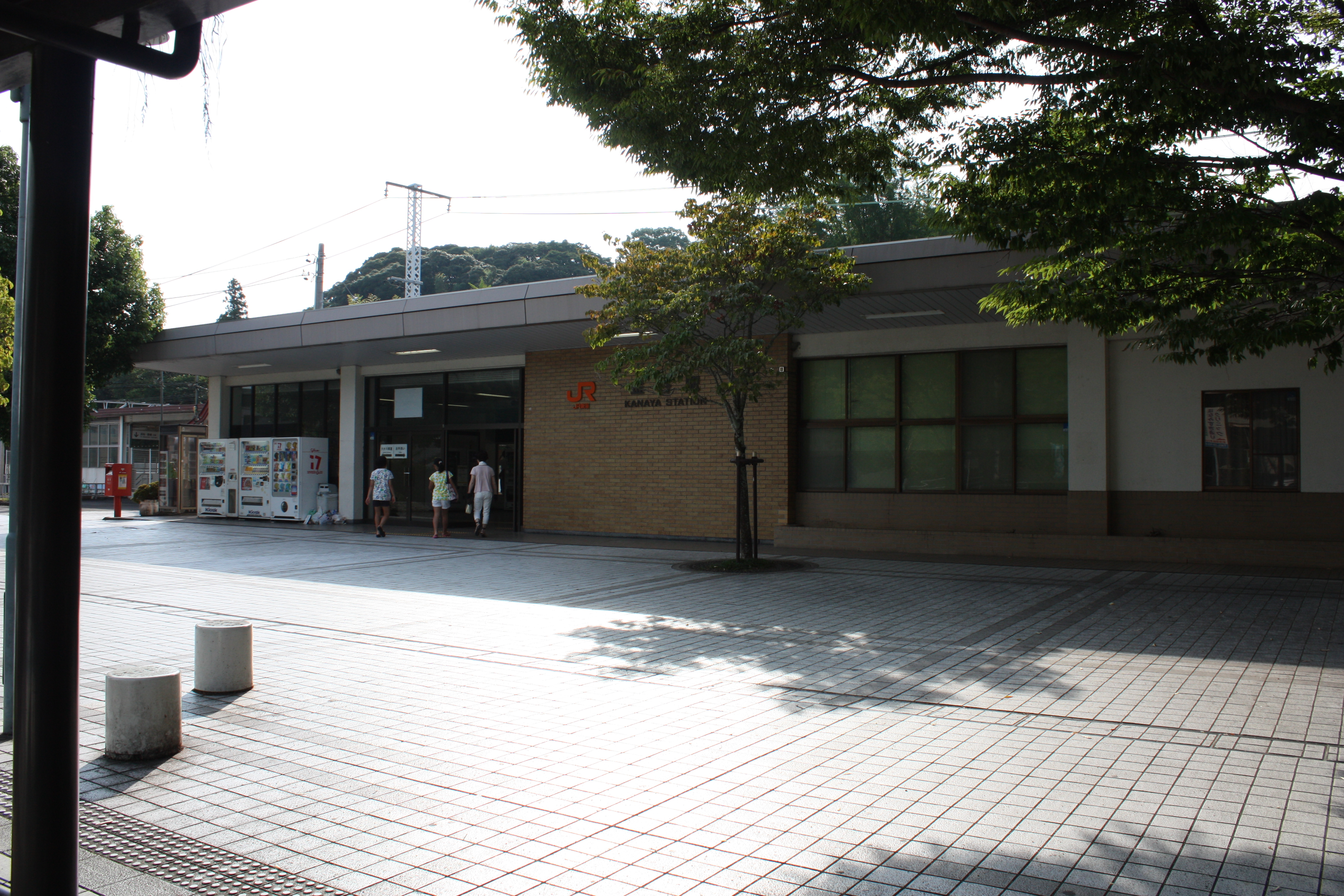 JR金谷駅駅舎